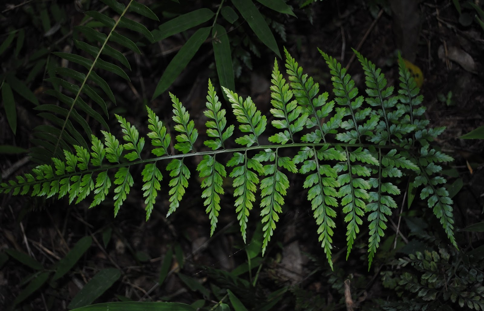 Asplenium divergens. Aspleniaceae. Fotos tomadas bajo bosque de quebrada al margen de pequeña cañada afluente del Arroyo Yerbal Chico en la Quebrada de los Cuervos, departamento de Treinta y Tres, Uruguay.